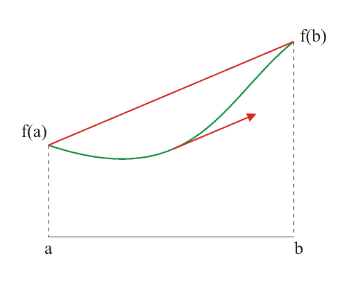 De afgeleide van een functie die op (a,b) differentieerbaar is, is op minstens één plaats gelijk aan de gemiddelde verandering van f op dat interval.